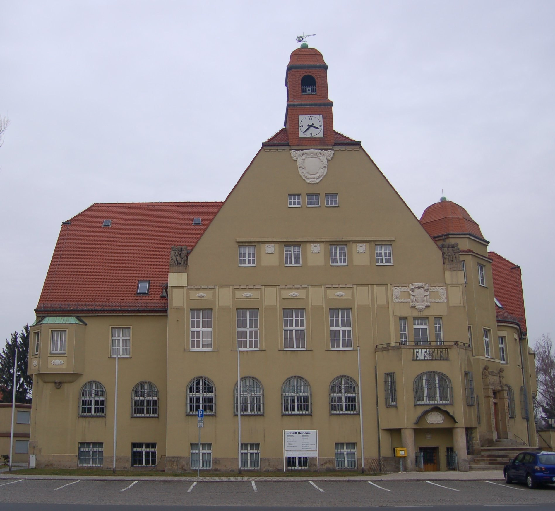 Town hall Heidenau(Saxony); Rathaus Heidenau (Sachsen)